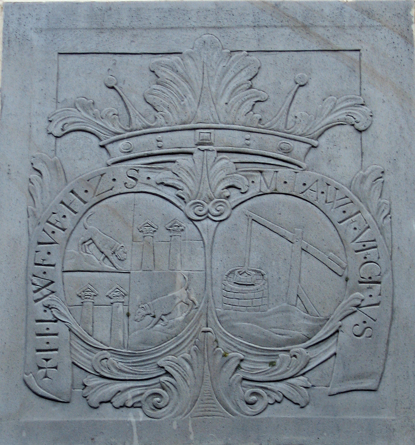 Wappen der Wagner von Hohenkirchen und Vilsheim in Sattelbogen (Oberpfalz)